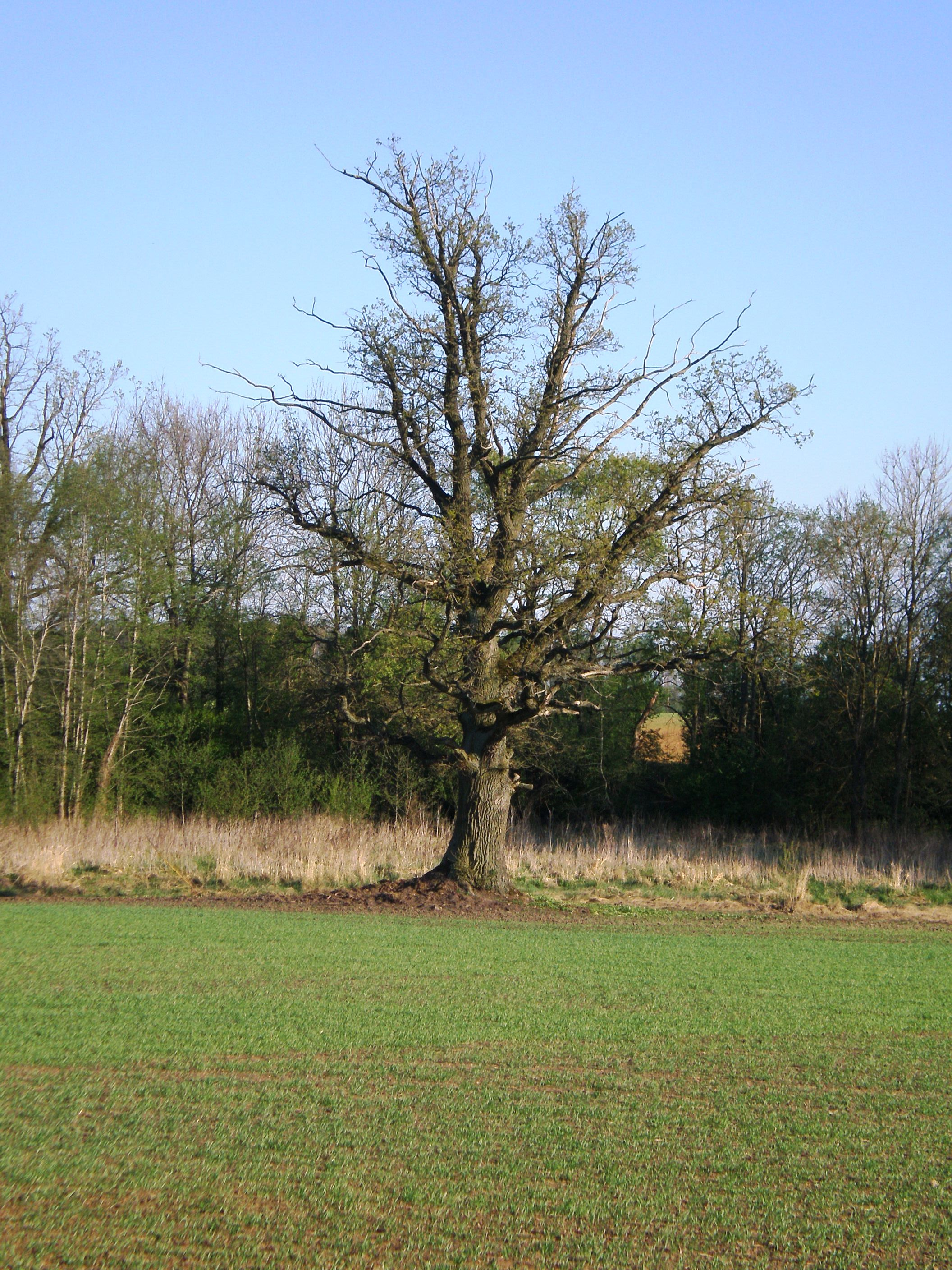 Ąžuolas šalia Barupės, netoli Serbinų, Kėdainių raj.